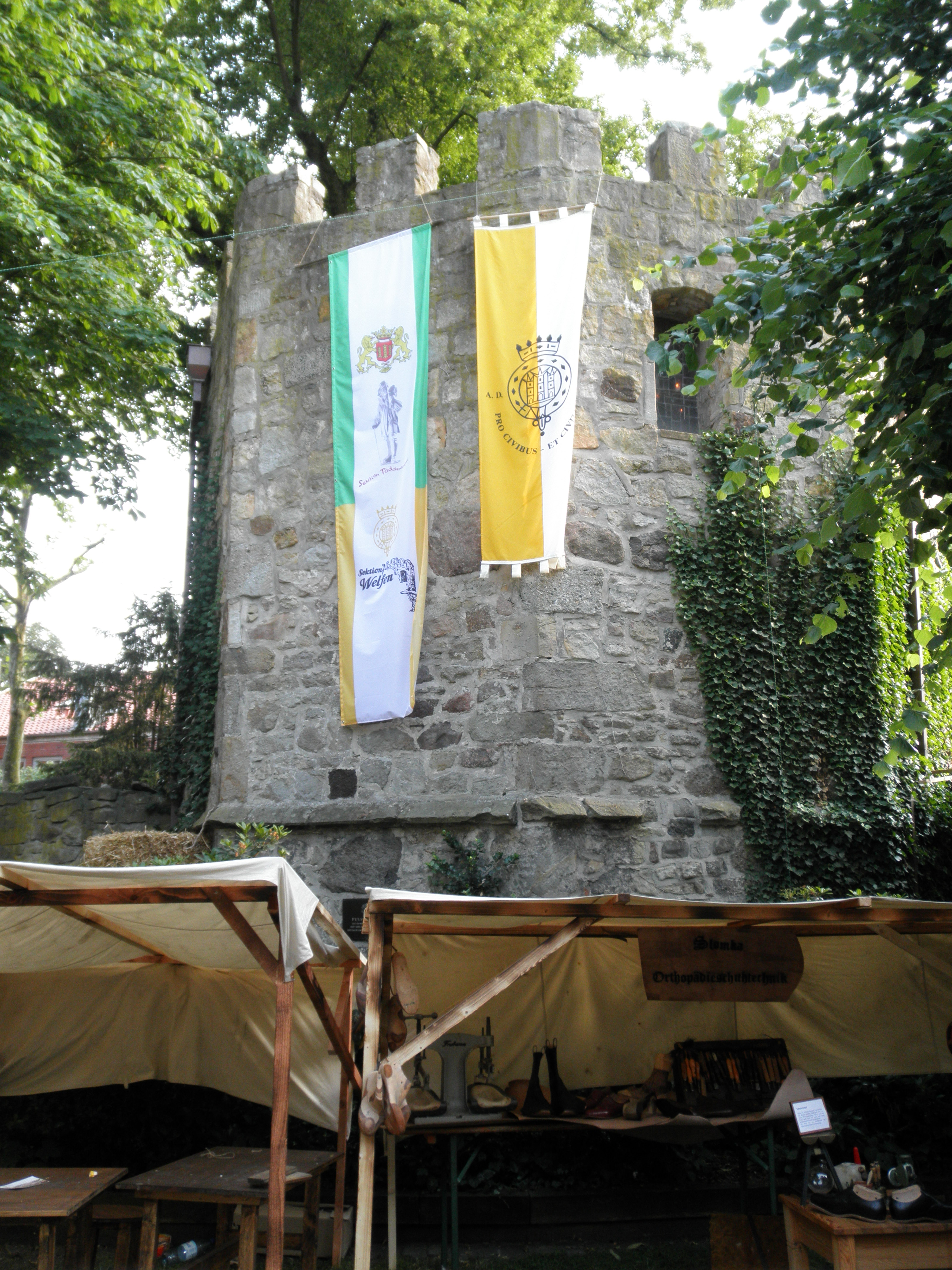 la historia "Pulverturm" (pulvoturo) dum la mezepoka Kivelingsfest 2011 en Lingen (Ems)